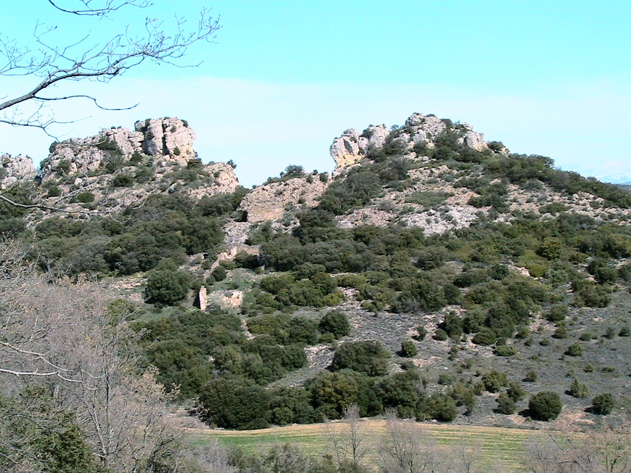 Les Picones, amb el Castell i Santa Maria de Montessor (Os de Balaguer)